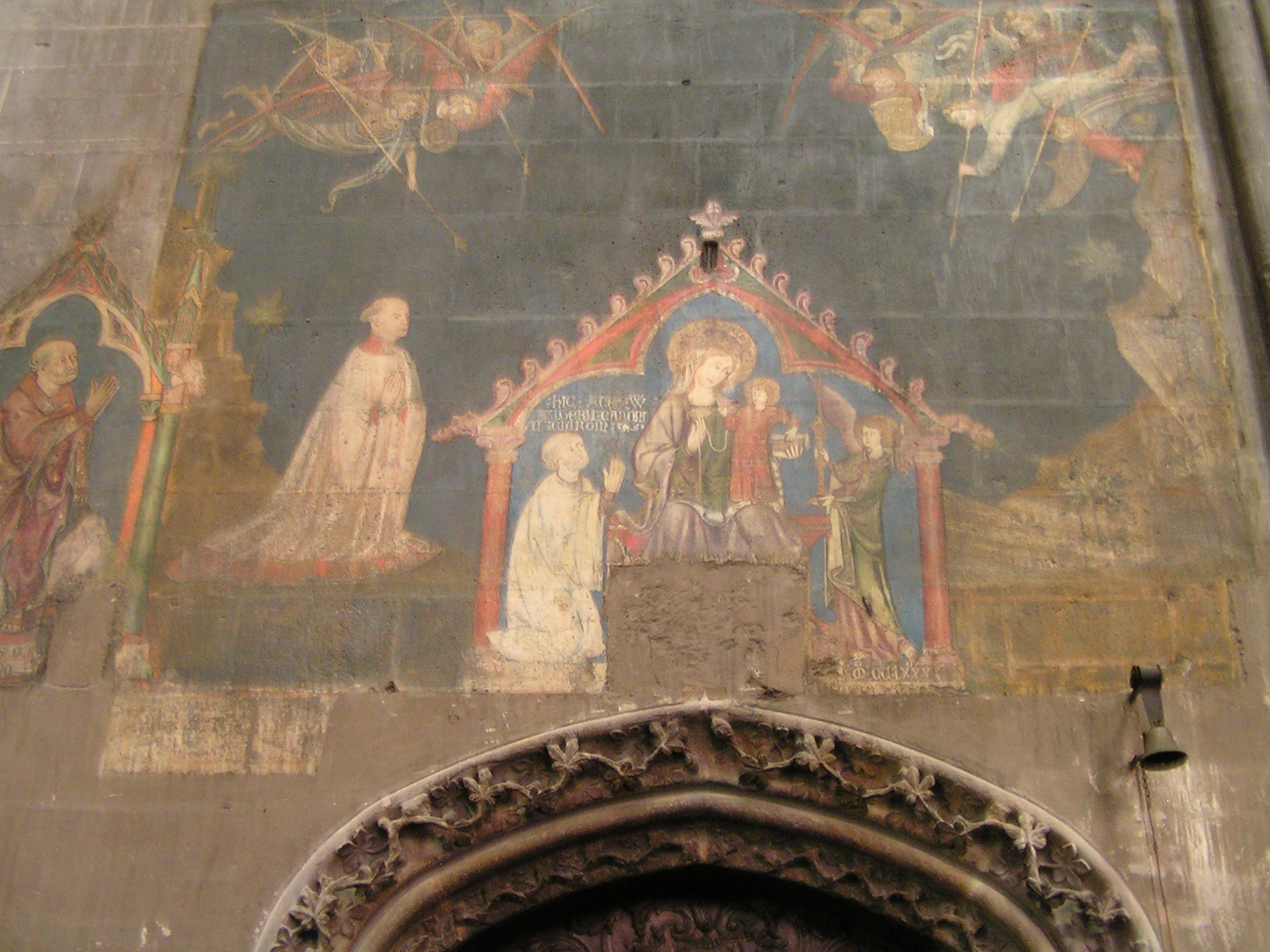 peintures à l'intérieur de la cathédrale de Clermont-Ferrand